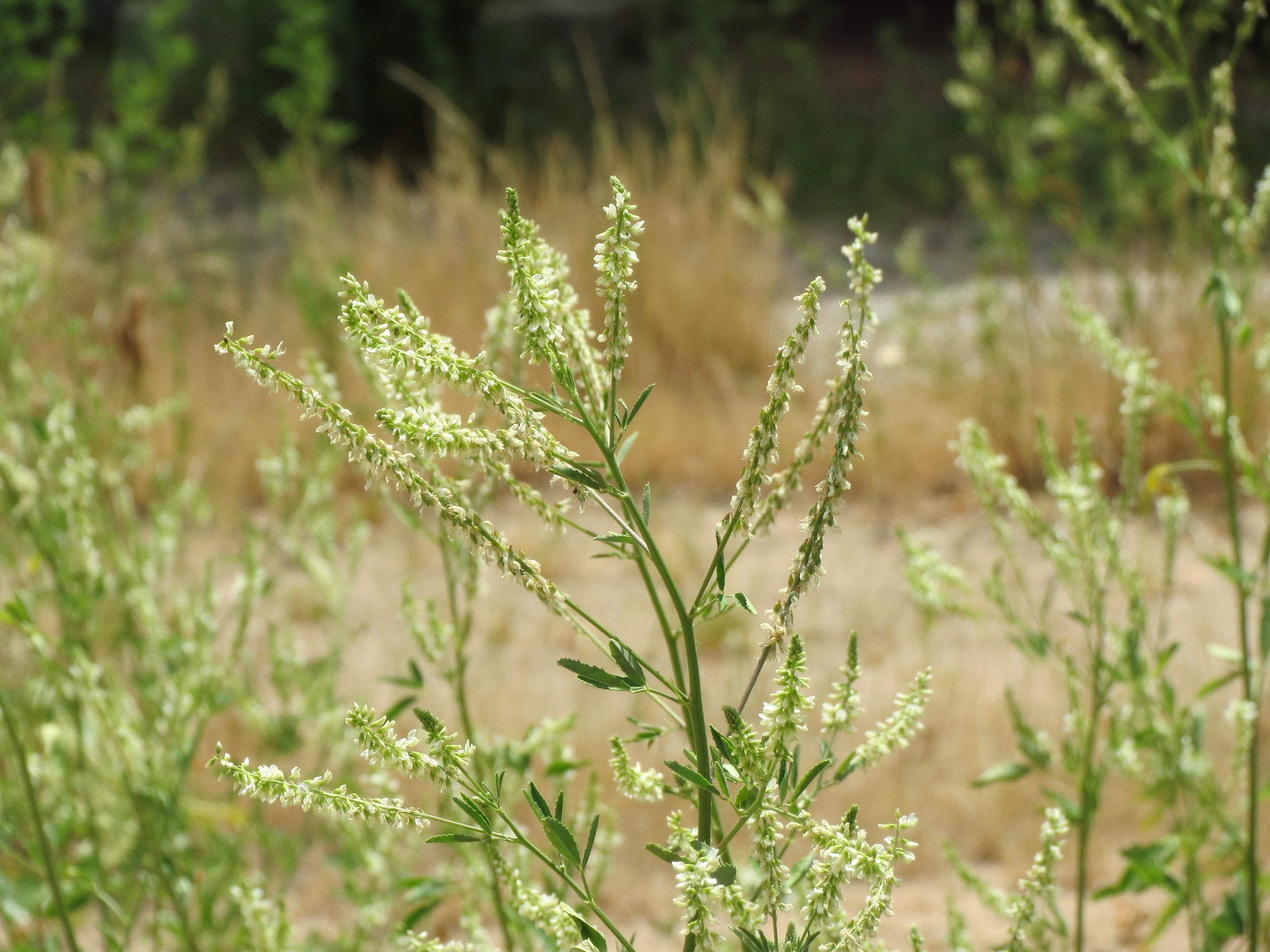 Weißer Steinklee (Melilotus albus) in Hockenheim